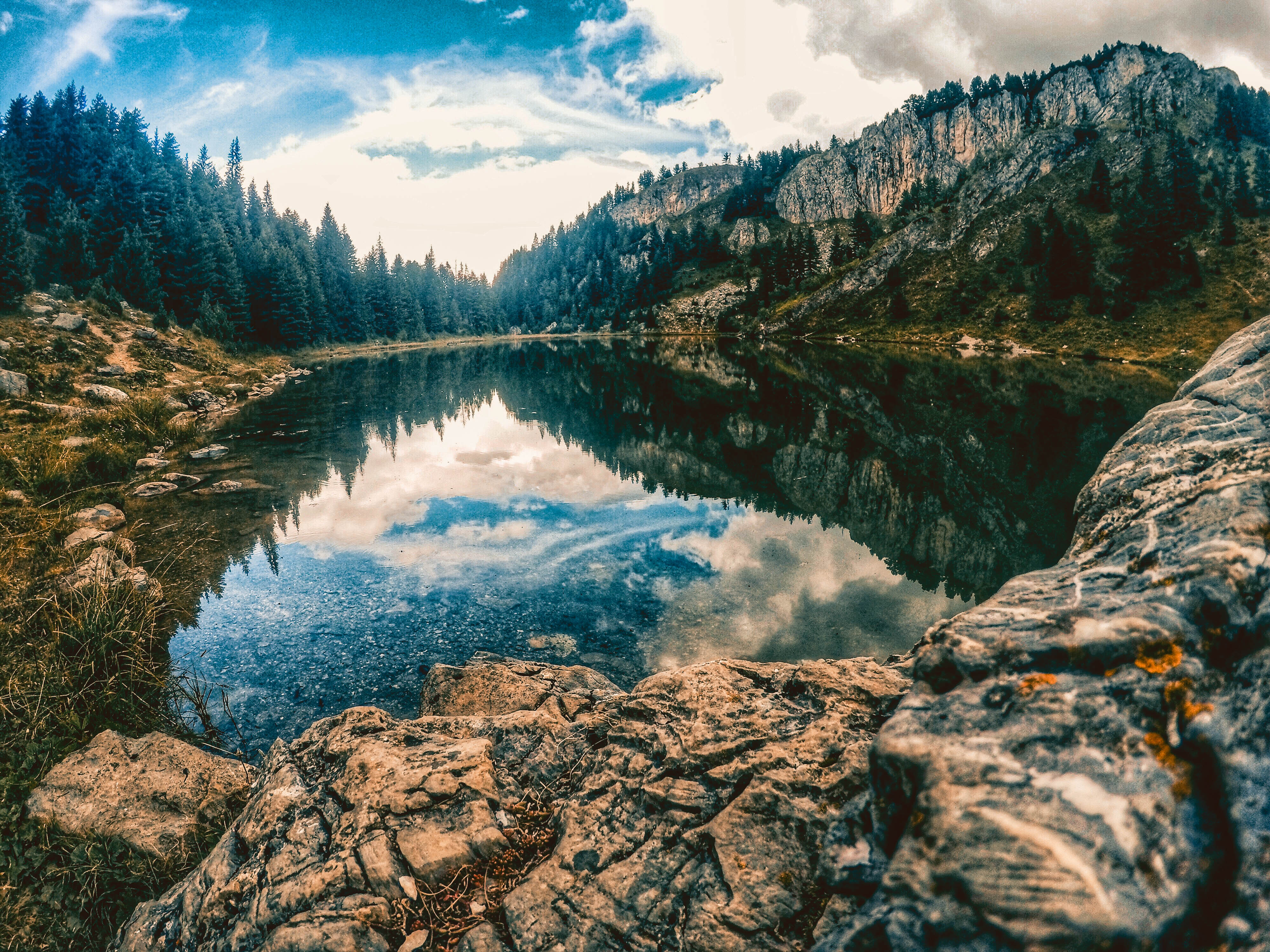 Liqenat_Rugovë